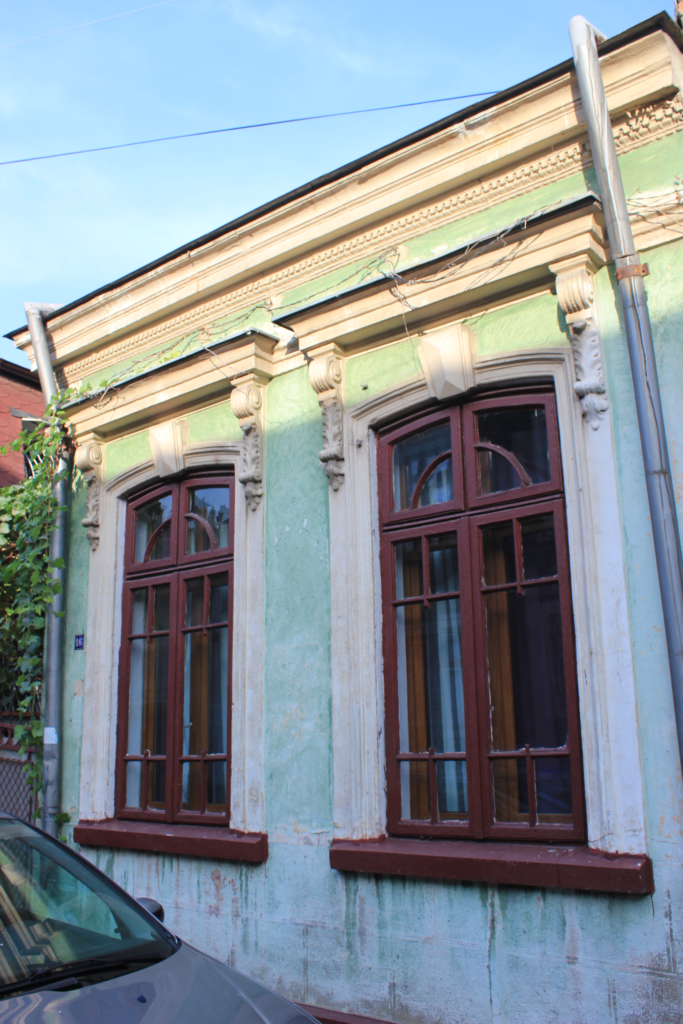 Casă Kiritescu Constantin 16